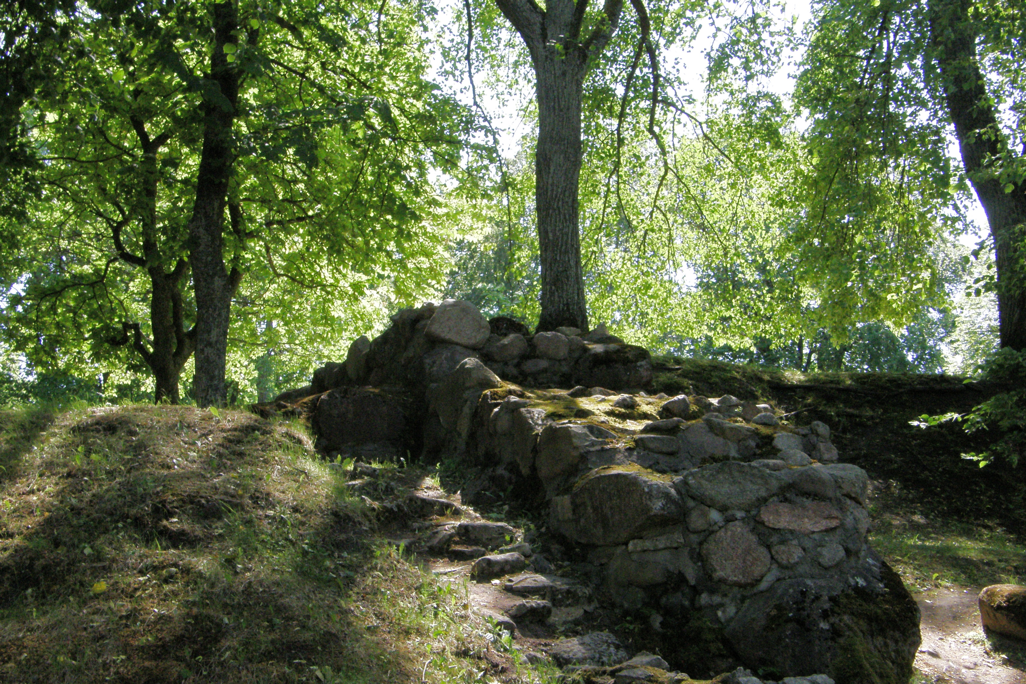 Livonijas ordeņa pilsdrupas